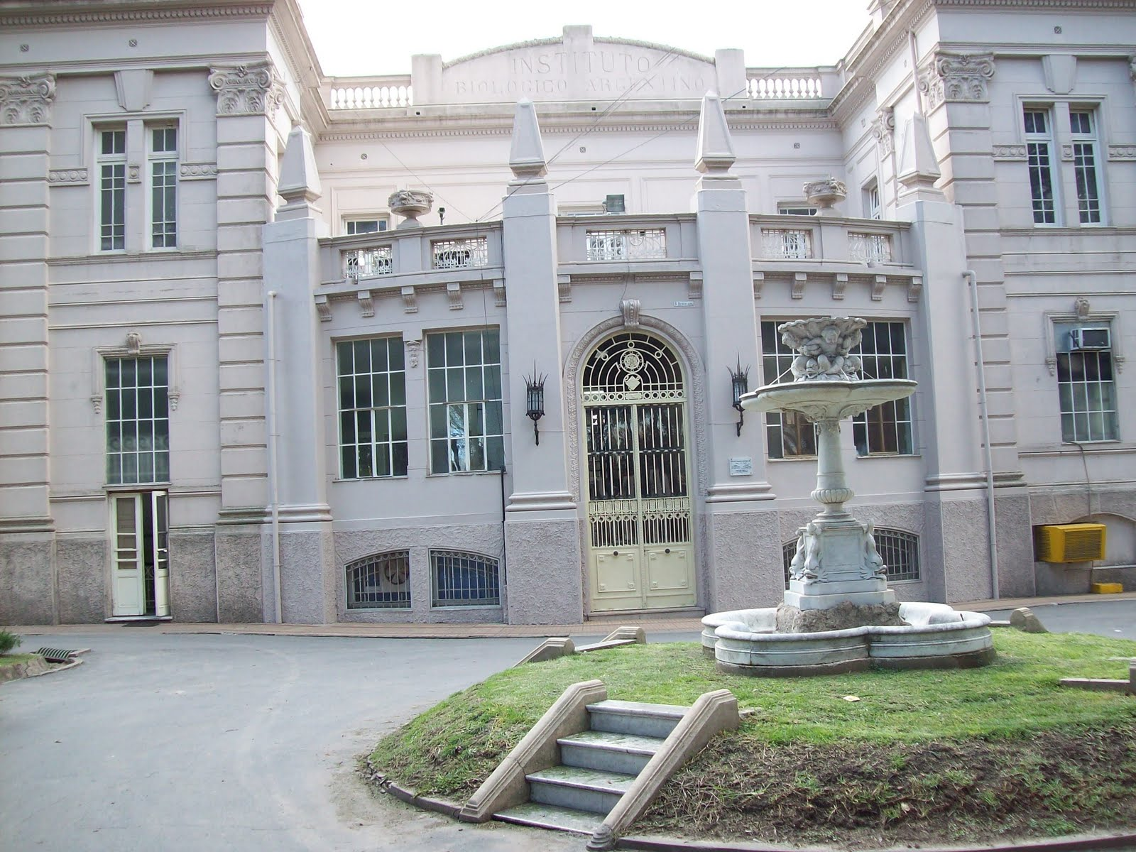 Foto del edifición central del Instituto Biologico Argentino de Florencio Varela.